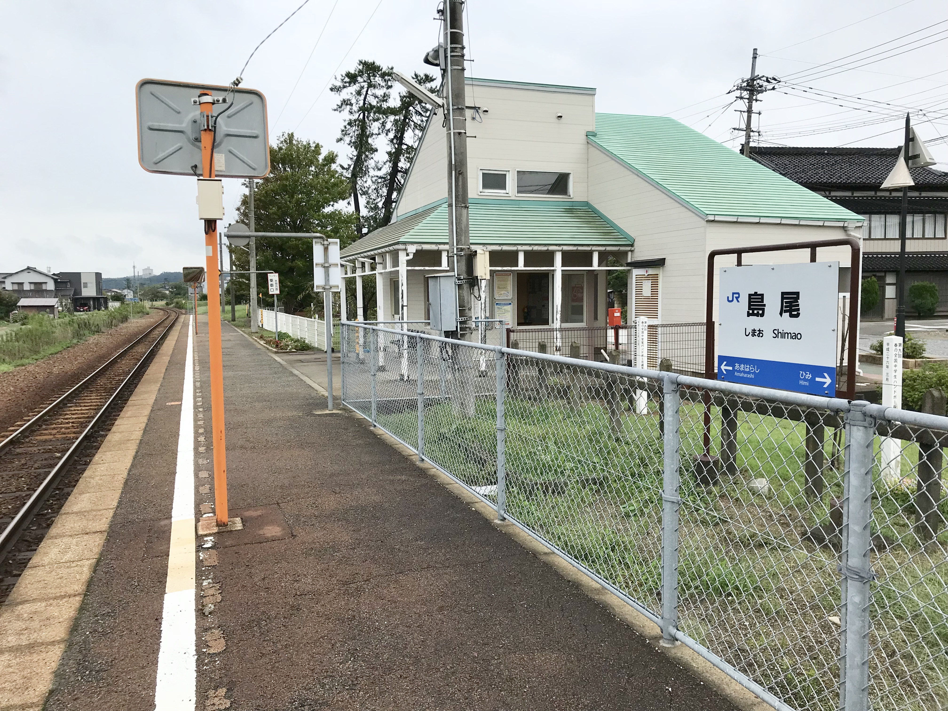 JR西日本氷見線島尾駅ホーム